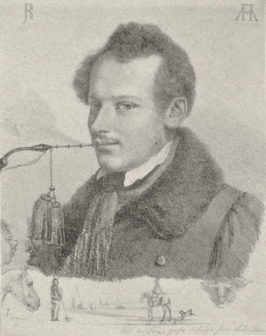 Porträt Rudolf Jordan (1834). Kohlezeichnung seines Schwagers Prof. Adolf Henning, Berlin. Der Künstler war zur Zeit der Herstellung dieses Porträts 25 Jahre alt.